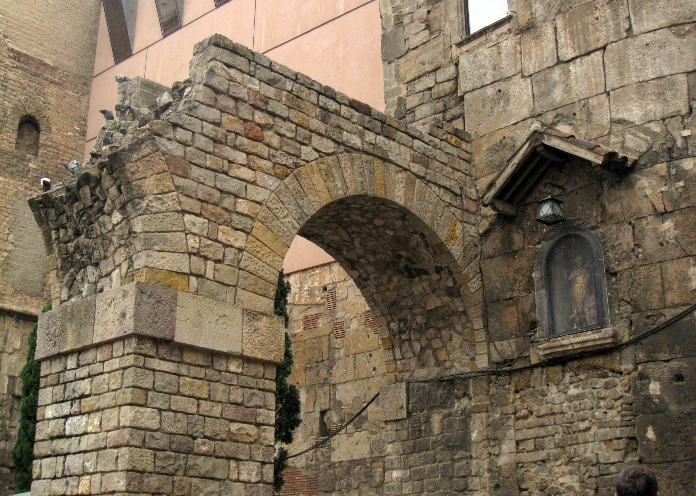 Muralla romana (Barcelona)